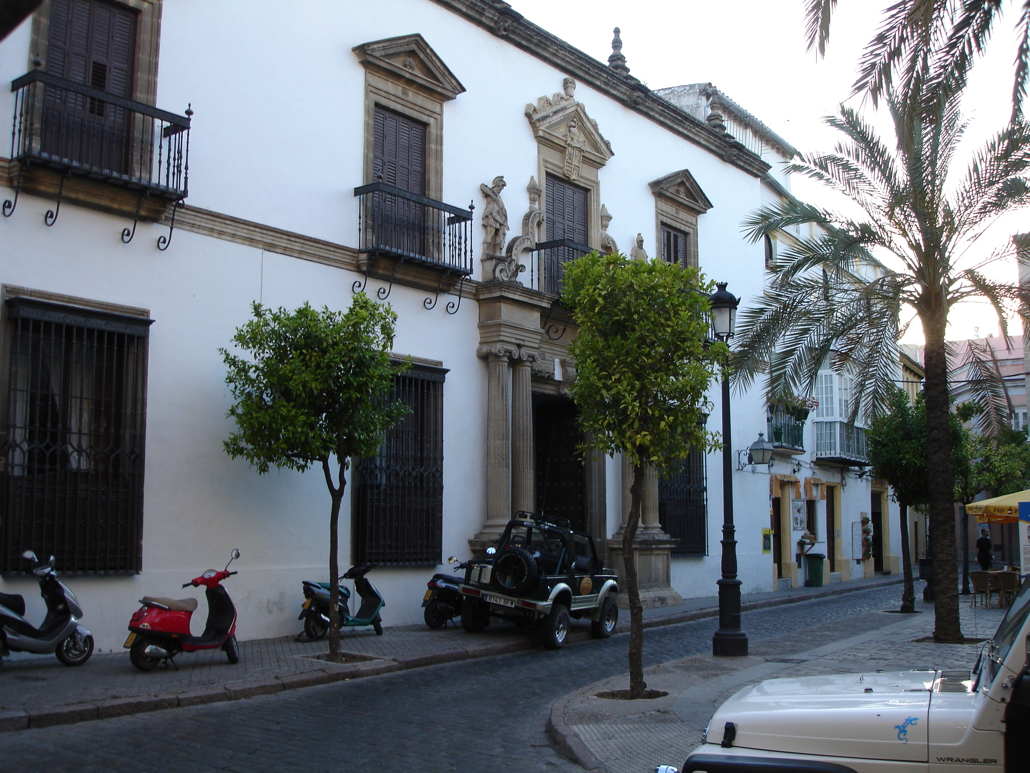 Casa Petra de la Riva. Jerez de la Frontera, Andalusia (Spain)